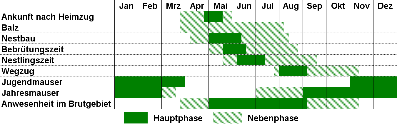 Jahreszyklus des Mauerseglers (Baden Württemberg), nach Jochen Hölzinger, Ulrich Mahler: Die Vögel Baden-Württembergs. Nicht-Singvögel; Band 3; Ulmer Verlag; Stuttgart 2001; Seite 305–318; ISBN 3-8001-3908-1